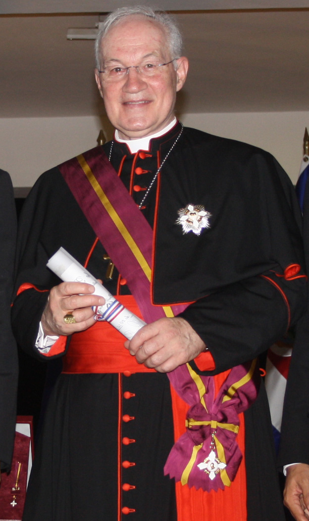 El Cardenal Marc Ouellet recibe la Orden de Vasco Núñez de Balboa